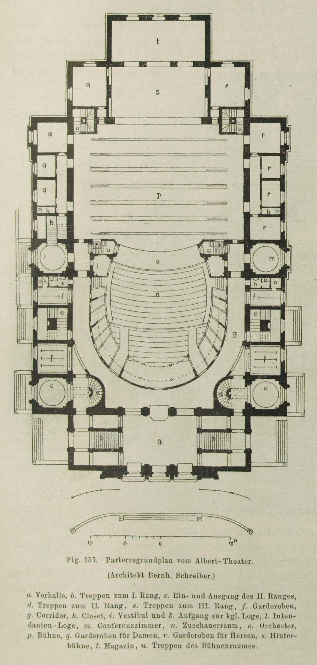 Grundriss Albert-Theater Dresden aus: Die Bauten, technischen und industriellen Anlagen von Dresden. Herausgegeben vom Sächs. Ingenieur- und Architekten-Verein und vom Dresdener Architekten-Verein. Meinhold, Dresden 1878